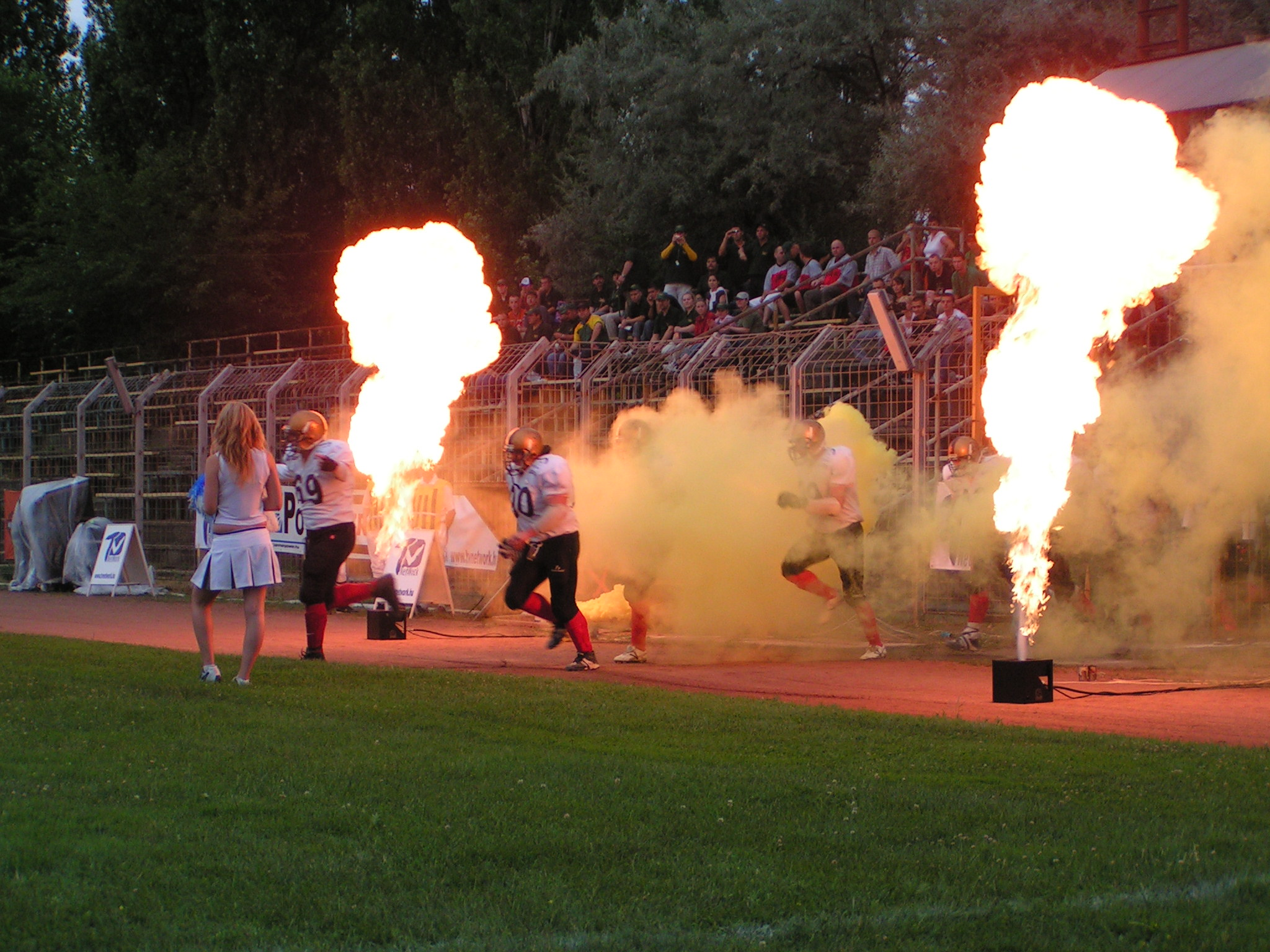 A II Hungarian Bowl bajnokság kezdete. A Győr Sharks csapat bevonul a pályára (BVSC-stadion, Budapest)